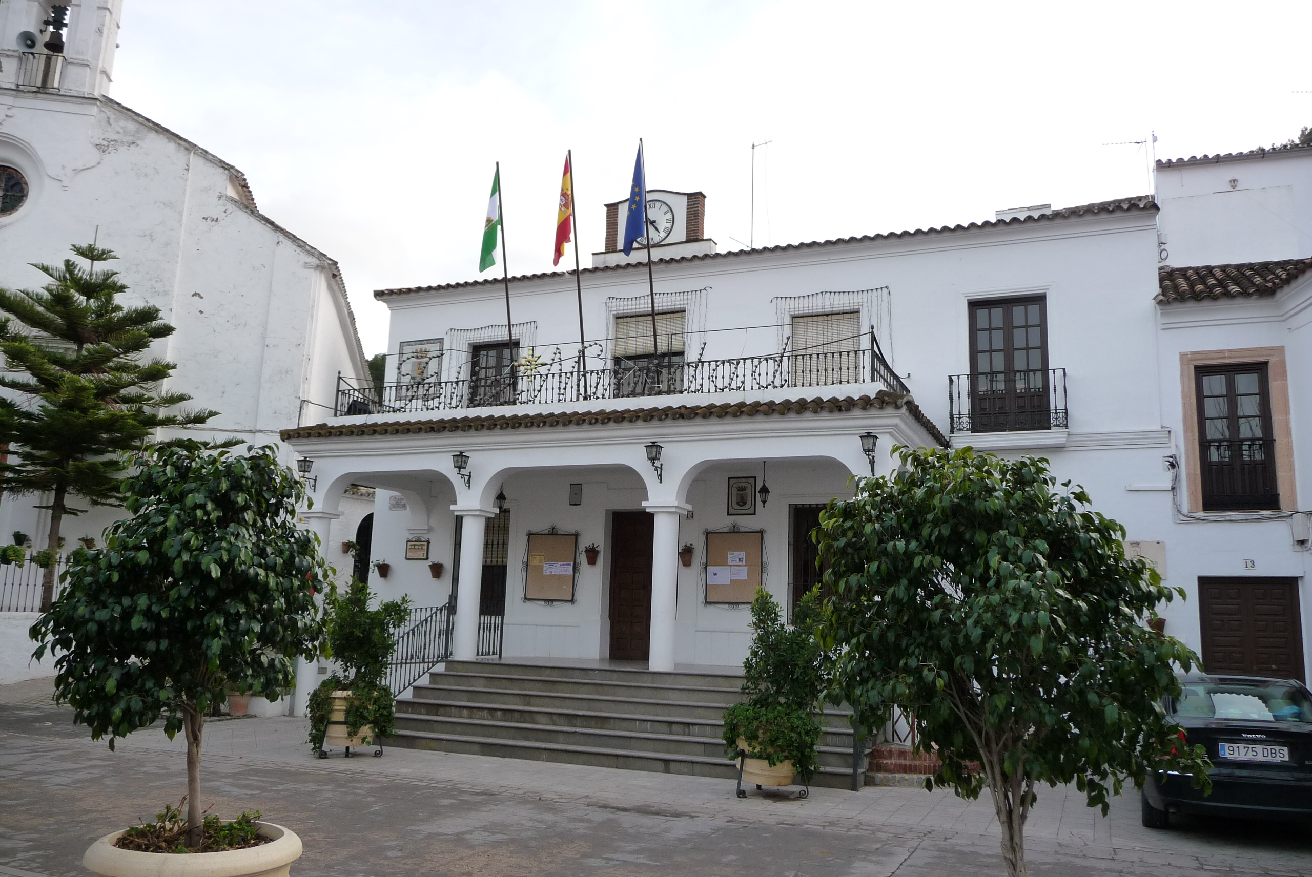 El Gastor (Andalusia, Spain).